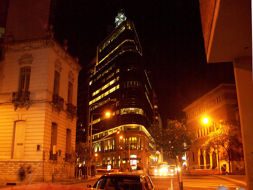 Ecipsa Tower de noche. Foto tomada desde calle Obispo Trejo en Nueva Córdoba. Córdoba, Argentina (26/04/2007).